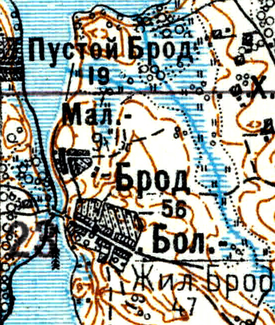 Топографическая карта Ленинградской области, квадрат Vc-29 (Батецкая), деревня Брод